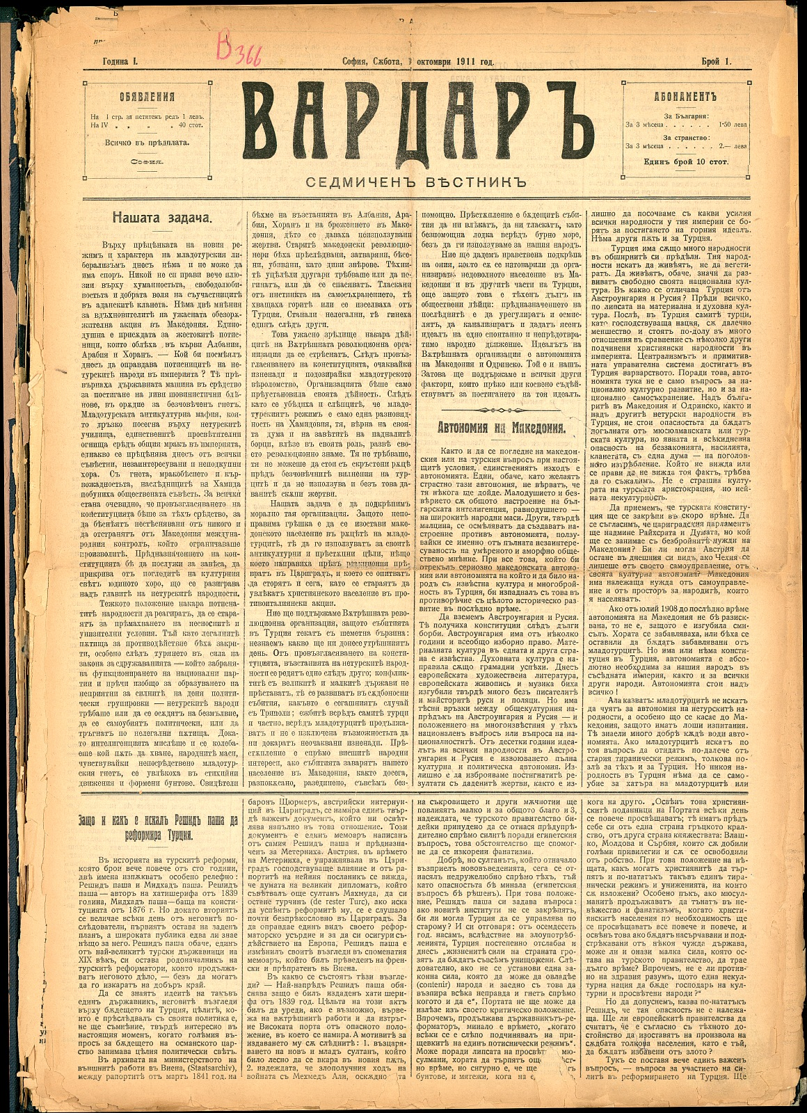 Вестник "Вардар", брой 1, 1 октомври 1911.